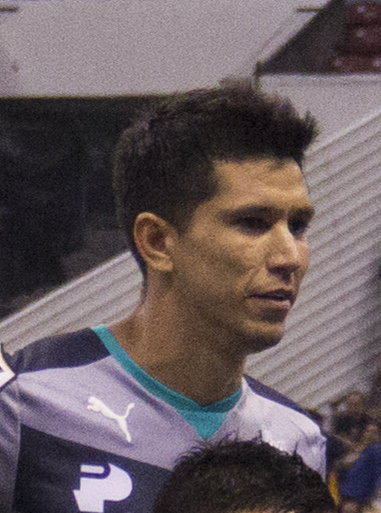 América vs Santos